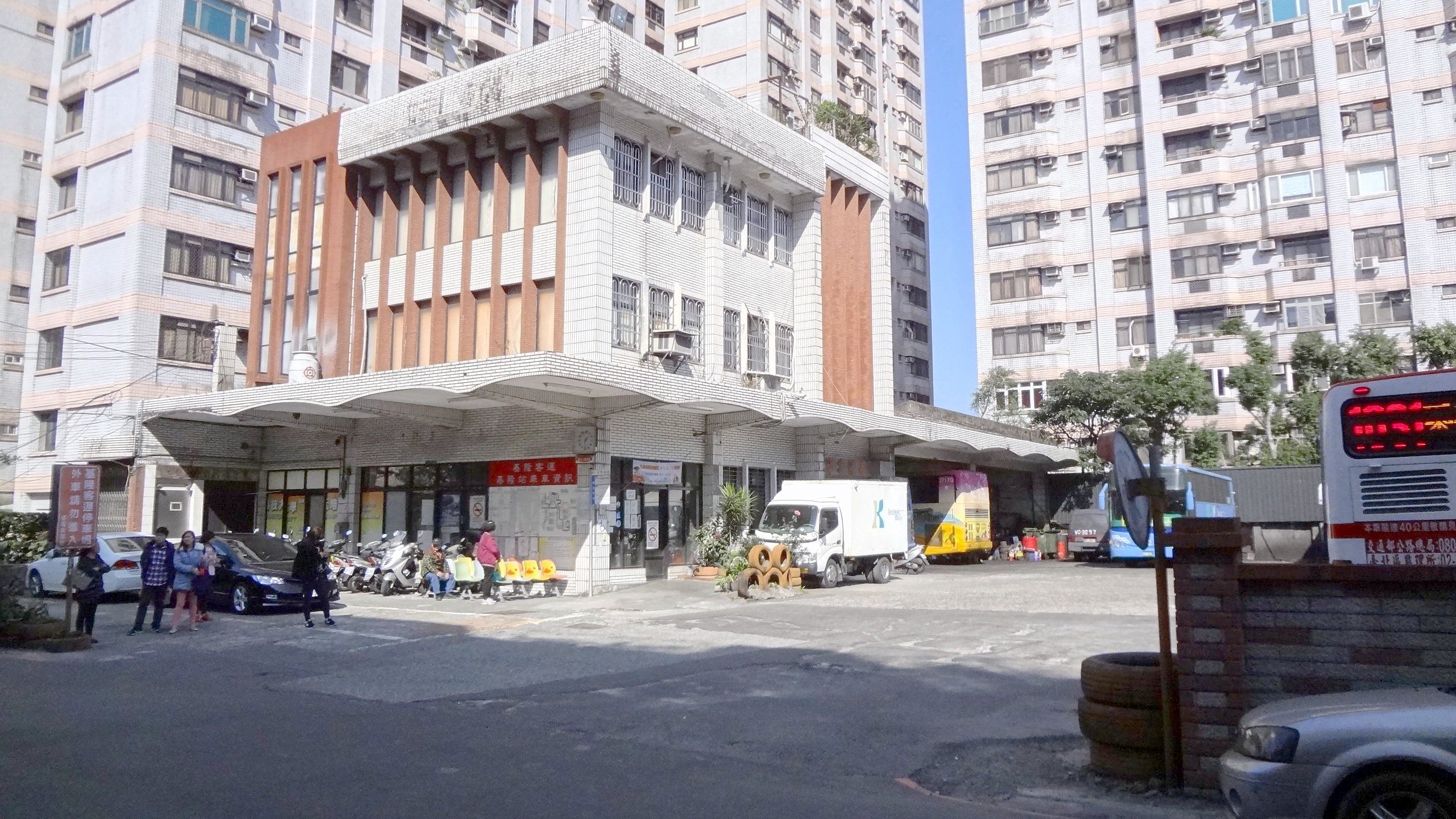 基隆客運總部與基隆站，位於臺灣基隆市安樂區樂利三街213號。總部頂端曾懸掛基隆客運第一代商標，拍攝時已拆除。